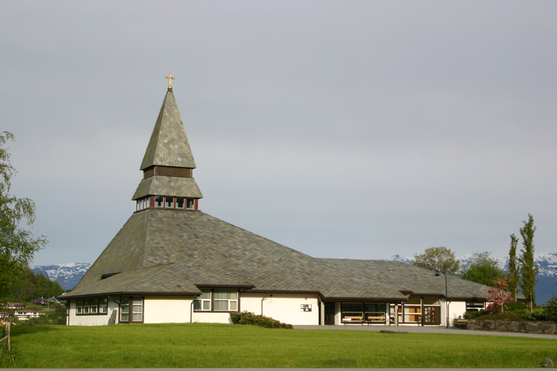 Norheimsund_Kyrkje (Church)